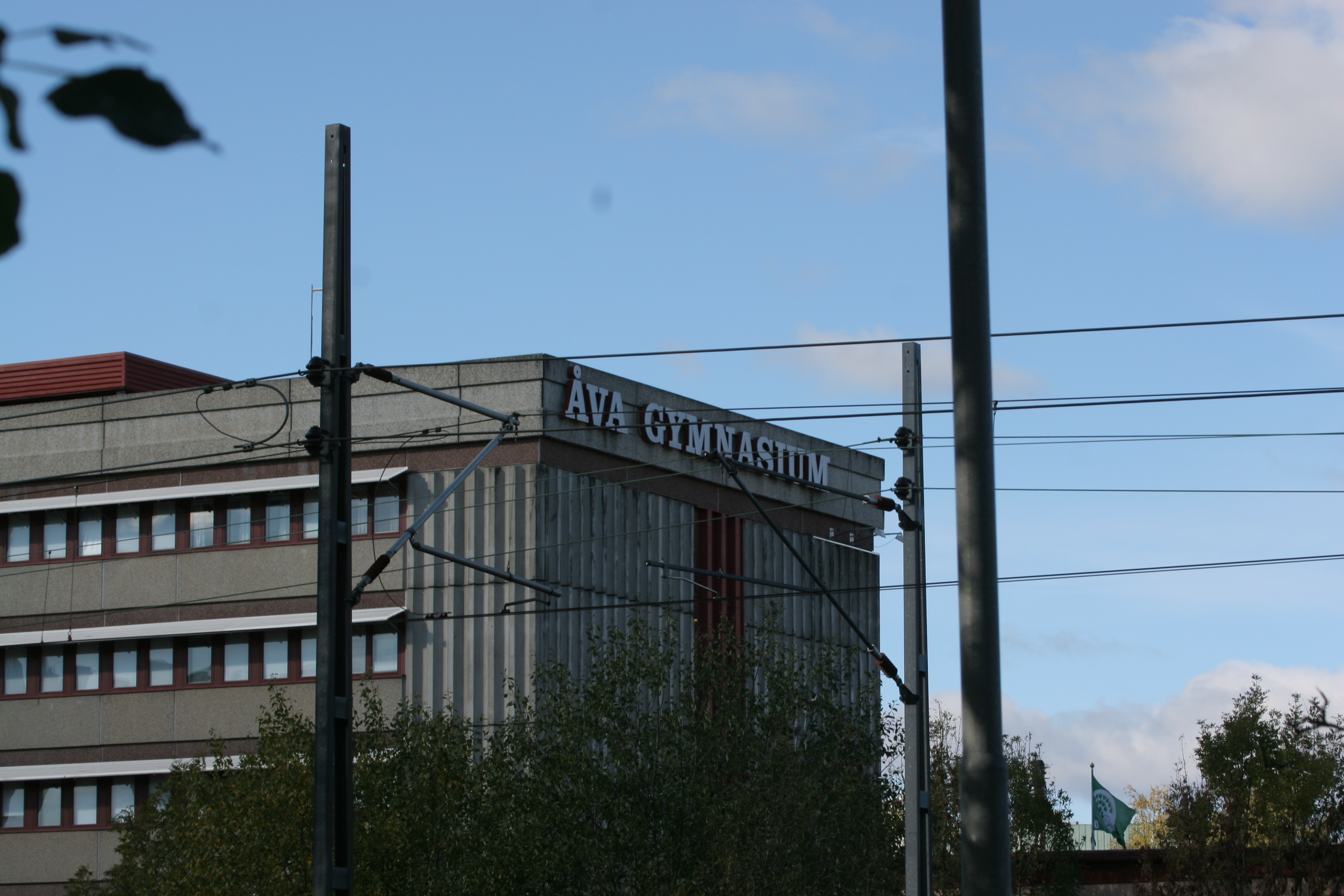 Bild på Åva Gymnasium, tagen mot den östra sidan av skolan.